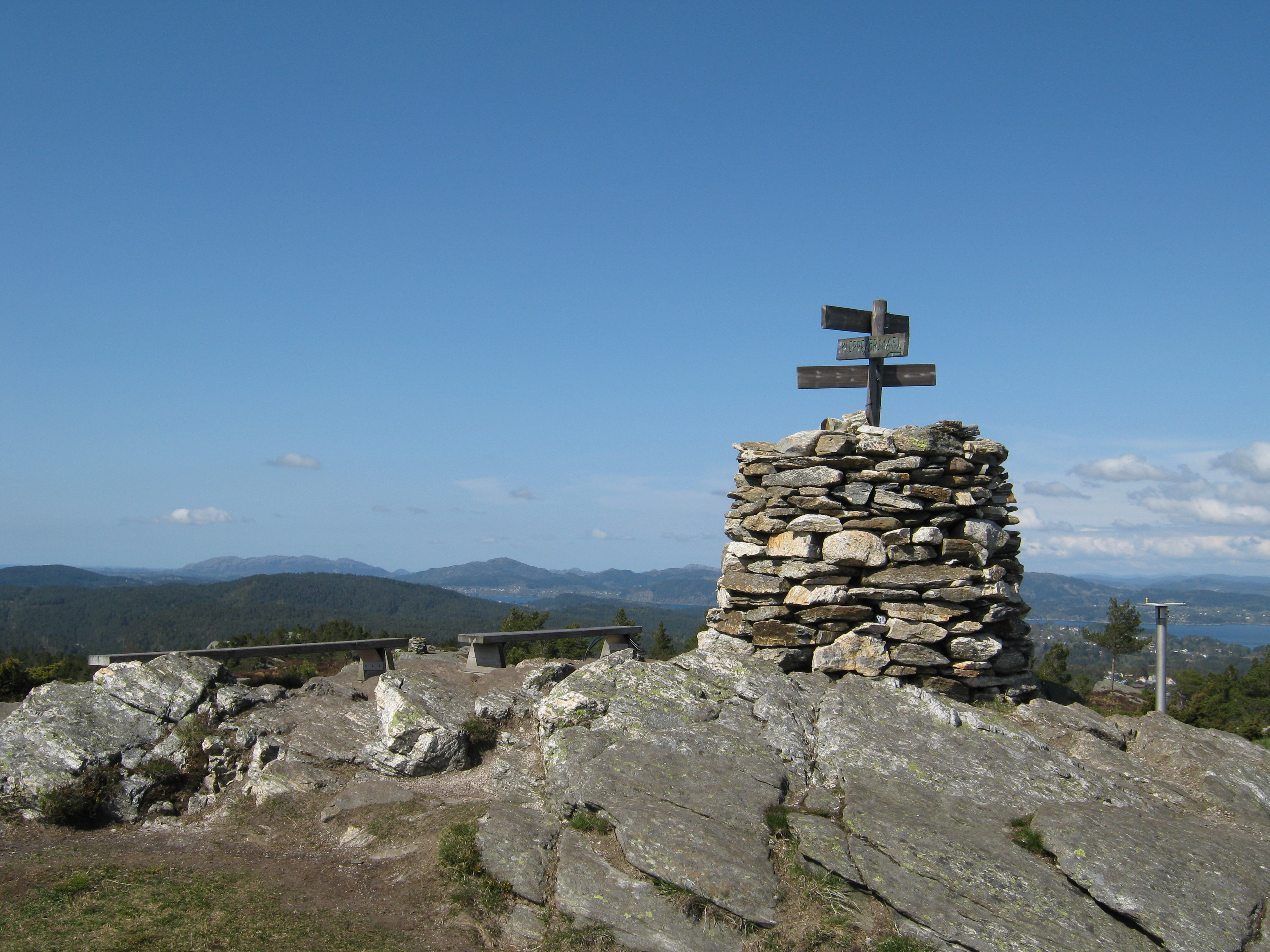 Varden på toppen av Kolbeinsvarden, det høyeste fjellet i Askøy kommune, Hordaland.